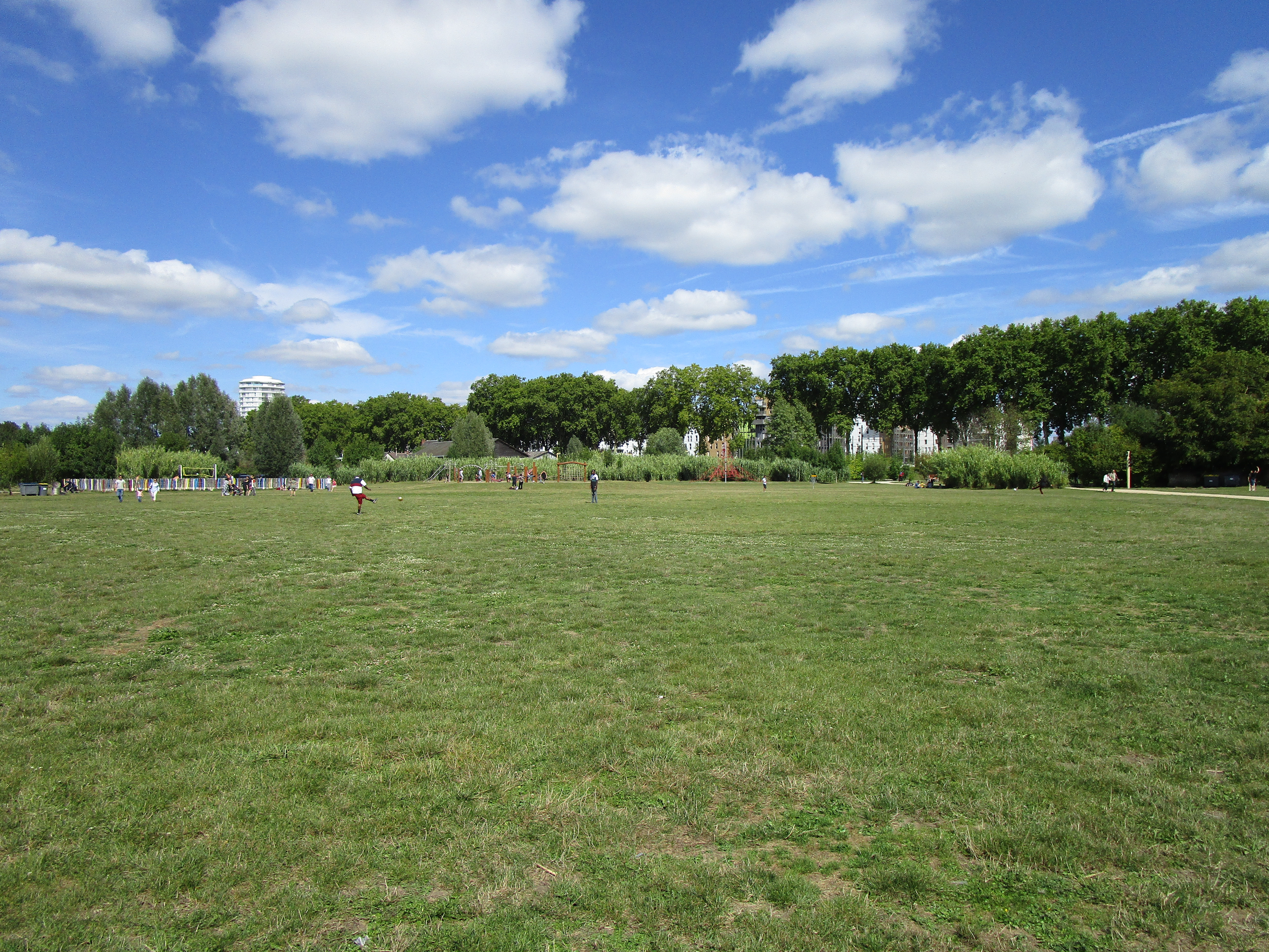 Le parc de la Gloriette, dans le quartier Deux-Lions de la ville de Tours.